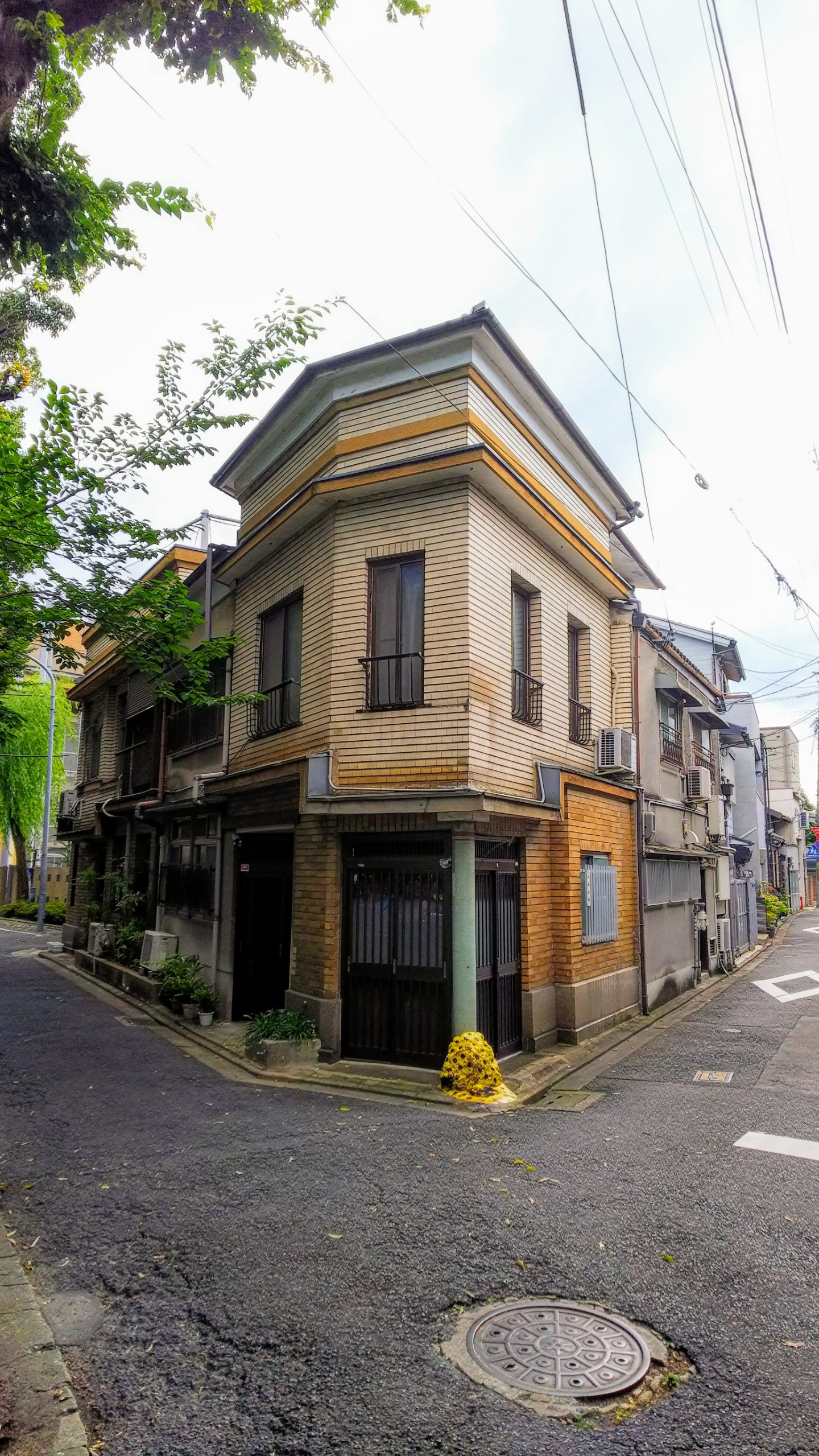 五条楽園 お茶屋 芙蓉